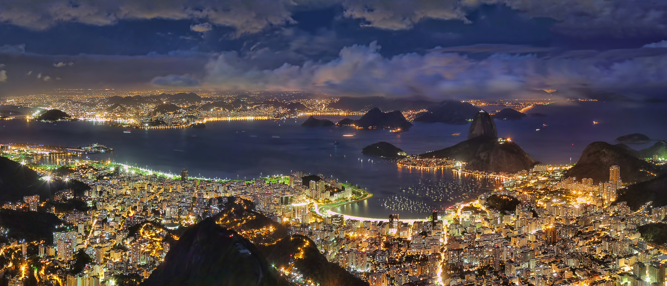 Vista para o Pão de Açúcar do Corcovado, à noite